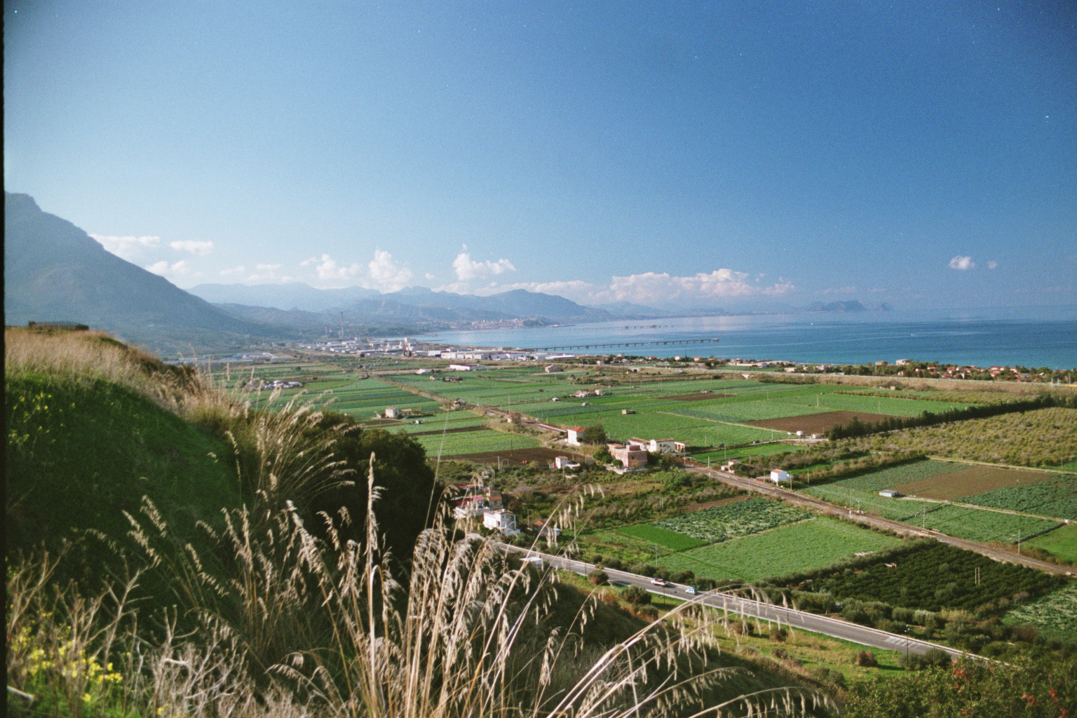 Himera